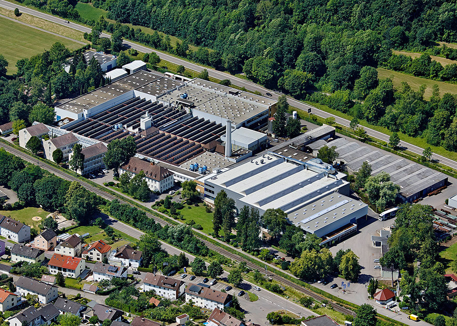 RUD Ketten Rieger & Dietz GmbH u. Co. KG Konzernzentrale auf der Friedensinsel, Aalen / Deutschland